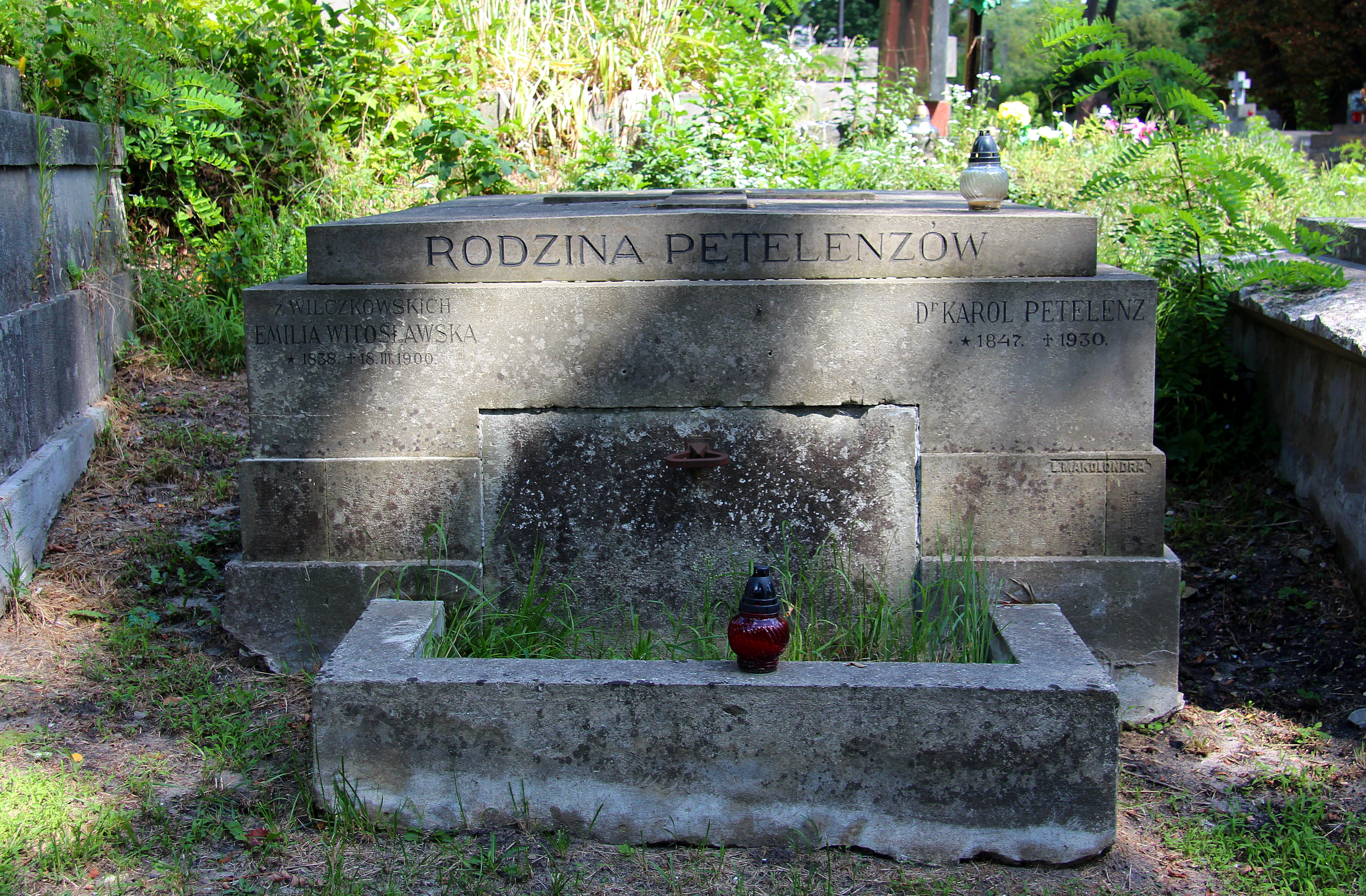 Karol Petelenz. Cmentarz Łyczakowski .